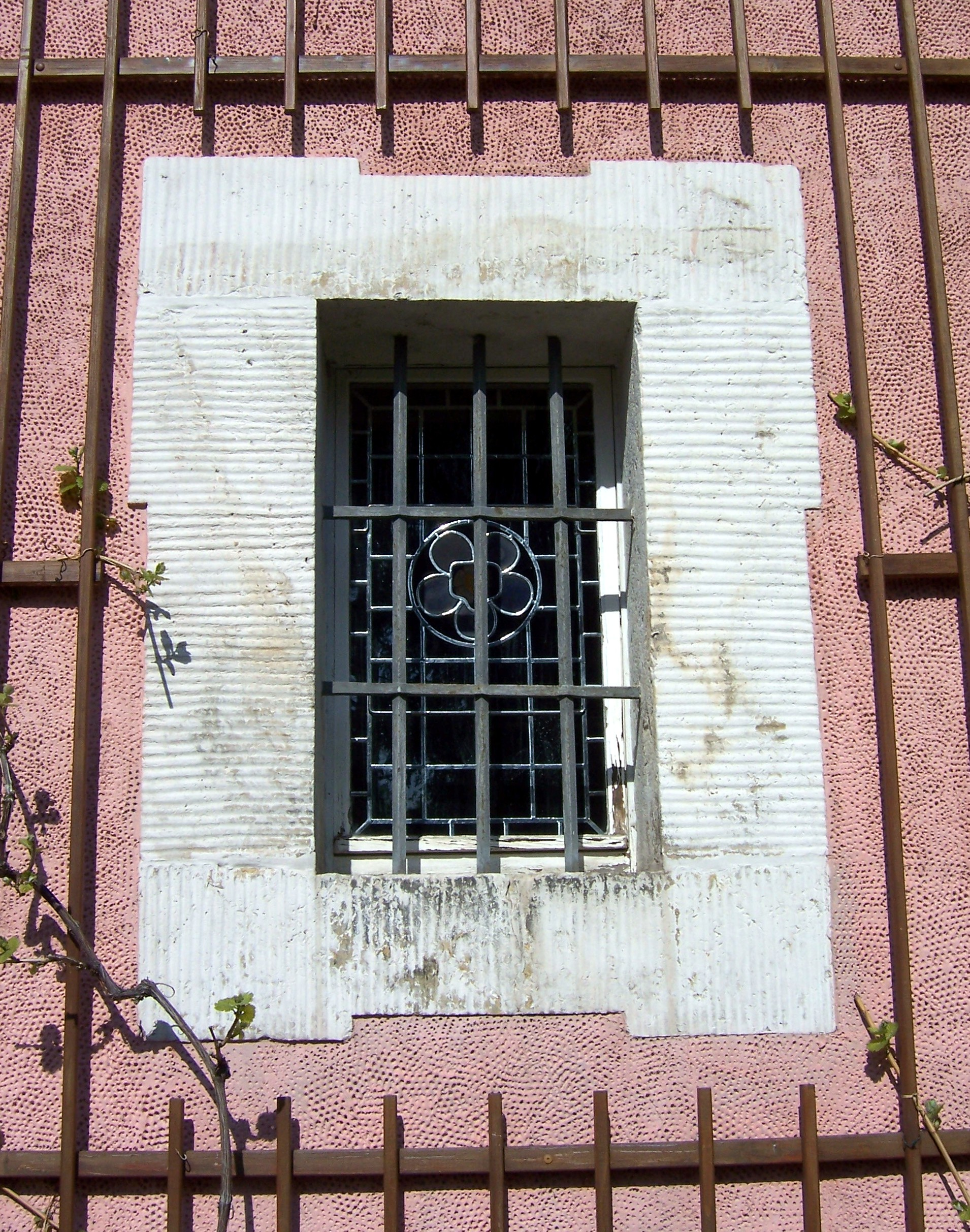 Fenster der Sakristei der Loschwitzer Kirche in Dresden mit Bleiverglasung und Glasmalerei.